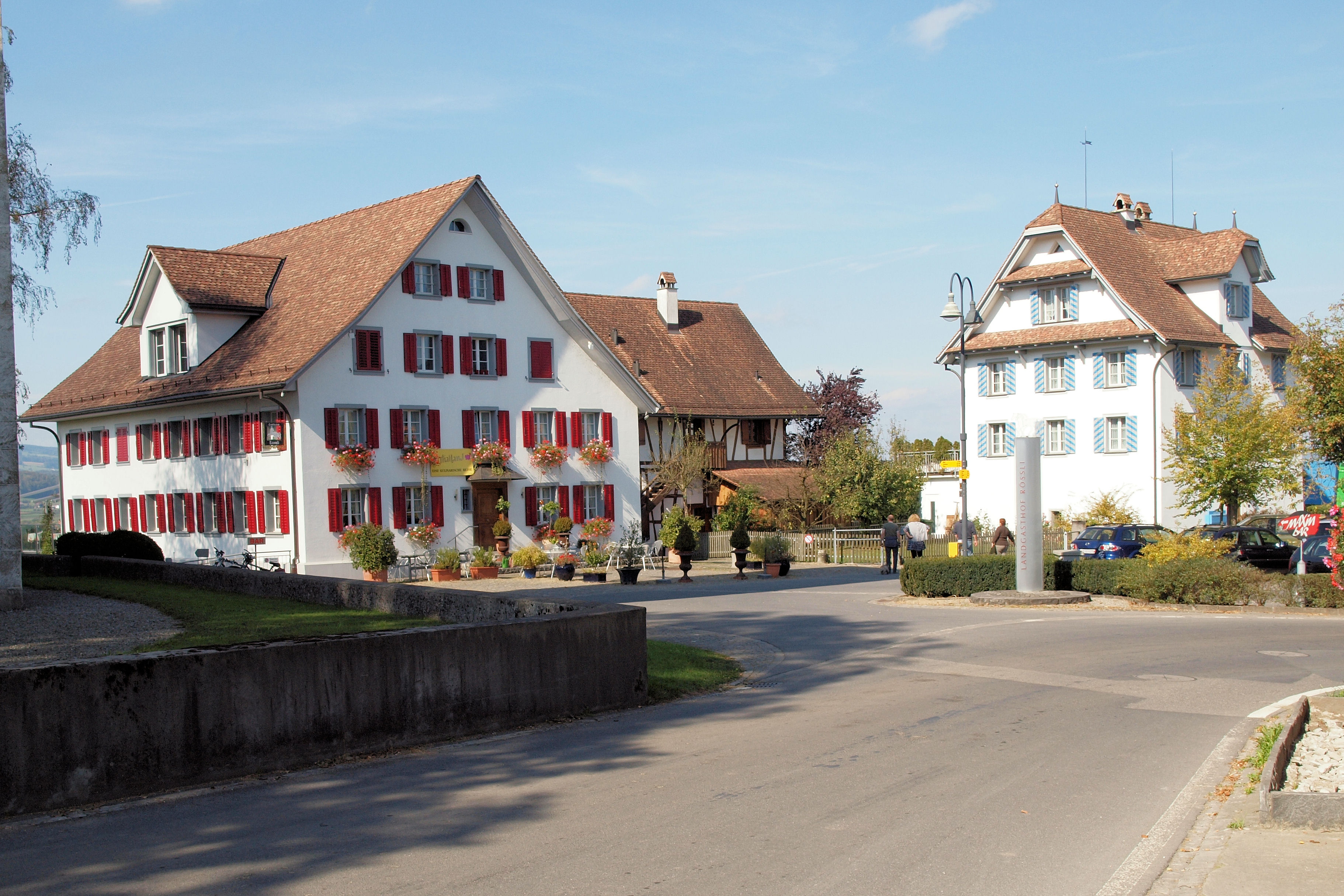 Kern des Weiler St. Wolfgang, in der Gemeinde Hünnenberg. Von Links das Gasthaus Rössli, in der Mitte leicht verdeckt die Trotte, rechts das Pfrundhaus. Links im Vordergurnd ist die Kirchmauer erkennbar.